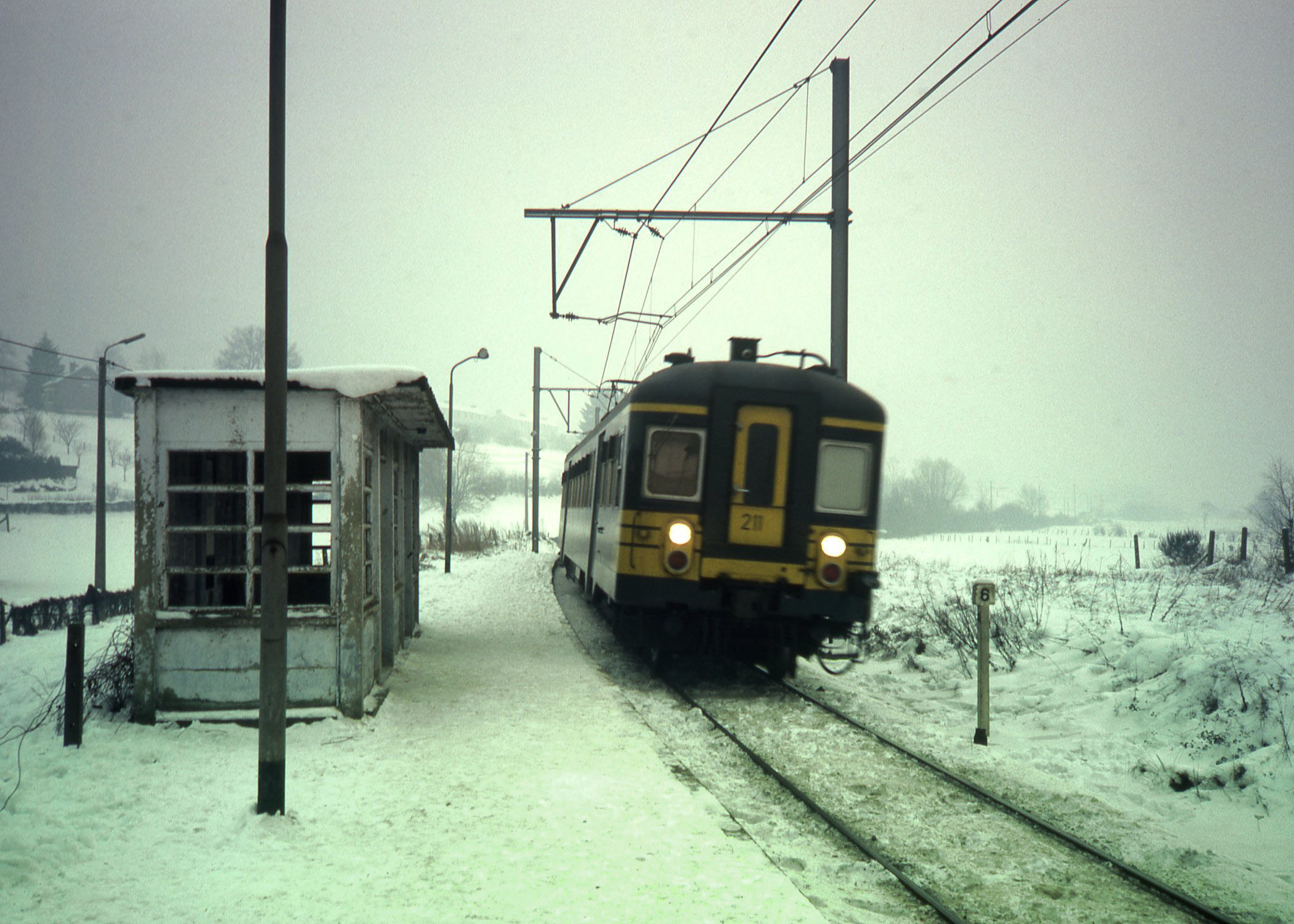 Bij de Franchimont halte in 1985 in de sneeuw. Diascan met kleurcorrectie.